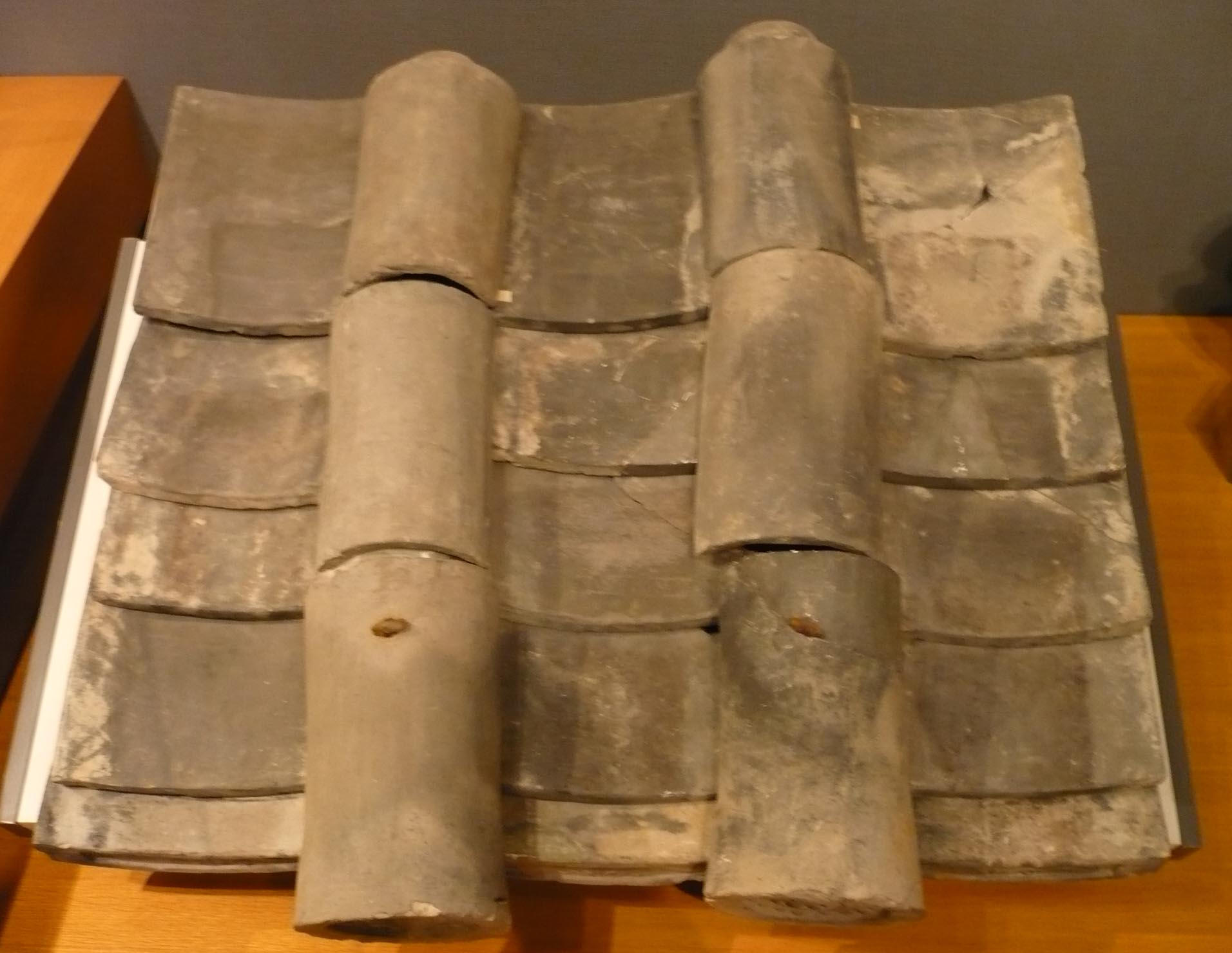 屋根瓦（遺物）